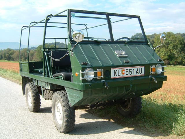 Das Foto zeigt einen Haflinger von 1967 in der Ausführung für die Österreichische Polizei.